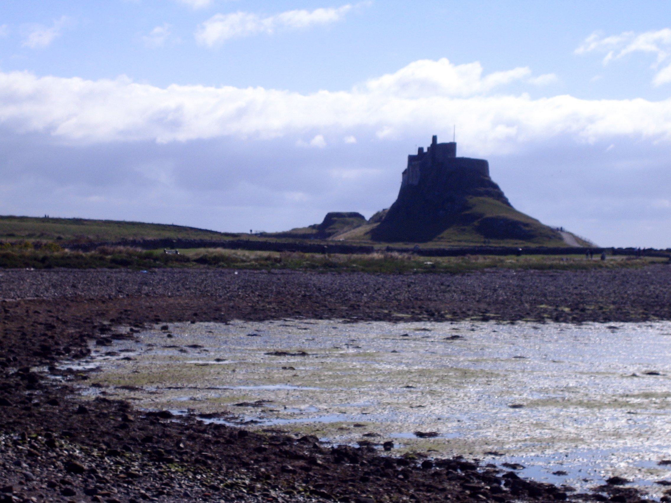 Lindisfarne Castle